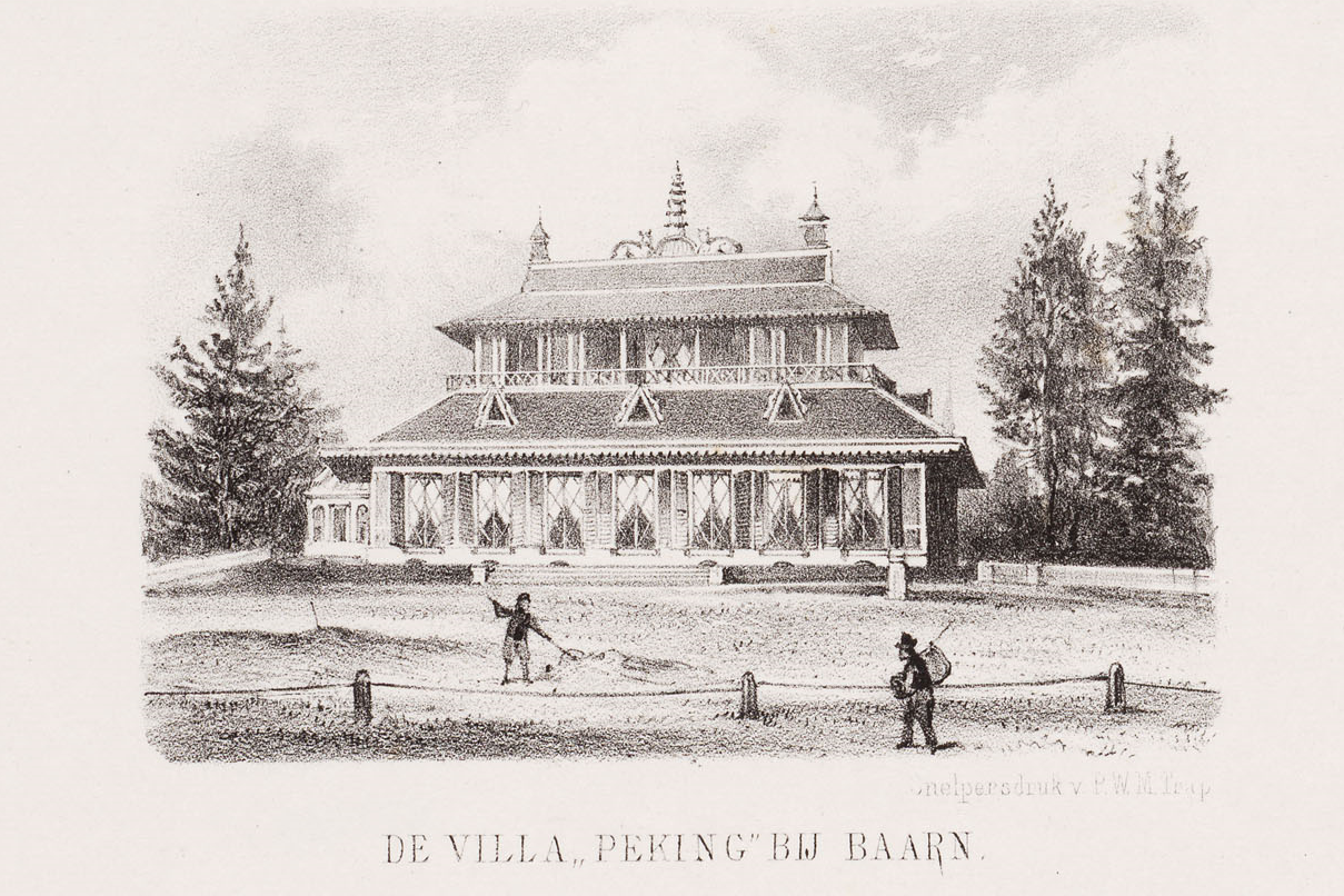 Villa Peking in Baarn door Trap, Pieter Willem Marinus (1821-1905) steendruk/lithografie [PK-1982-P-3/7], Topografie van Nederland, Universiteitsbibliotheek Leiden